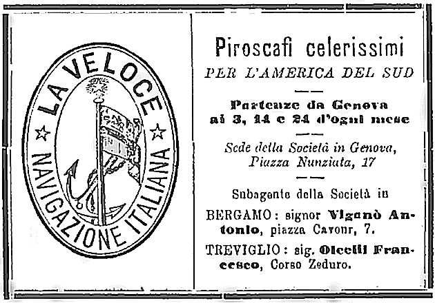 Inserzione pubblicitaria del 23.1.1890 su la Gazzetta provinciale di Bergamo, Italia - La Veloce Navigazione Italiana - partenze da Genova per l'America del Sud i giorni 3, 11 e 24 di ogni mese